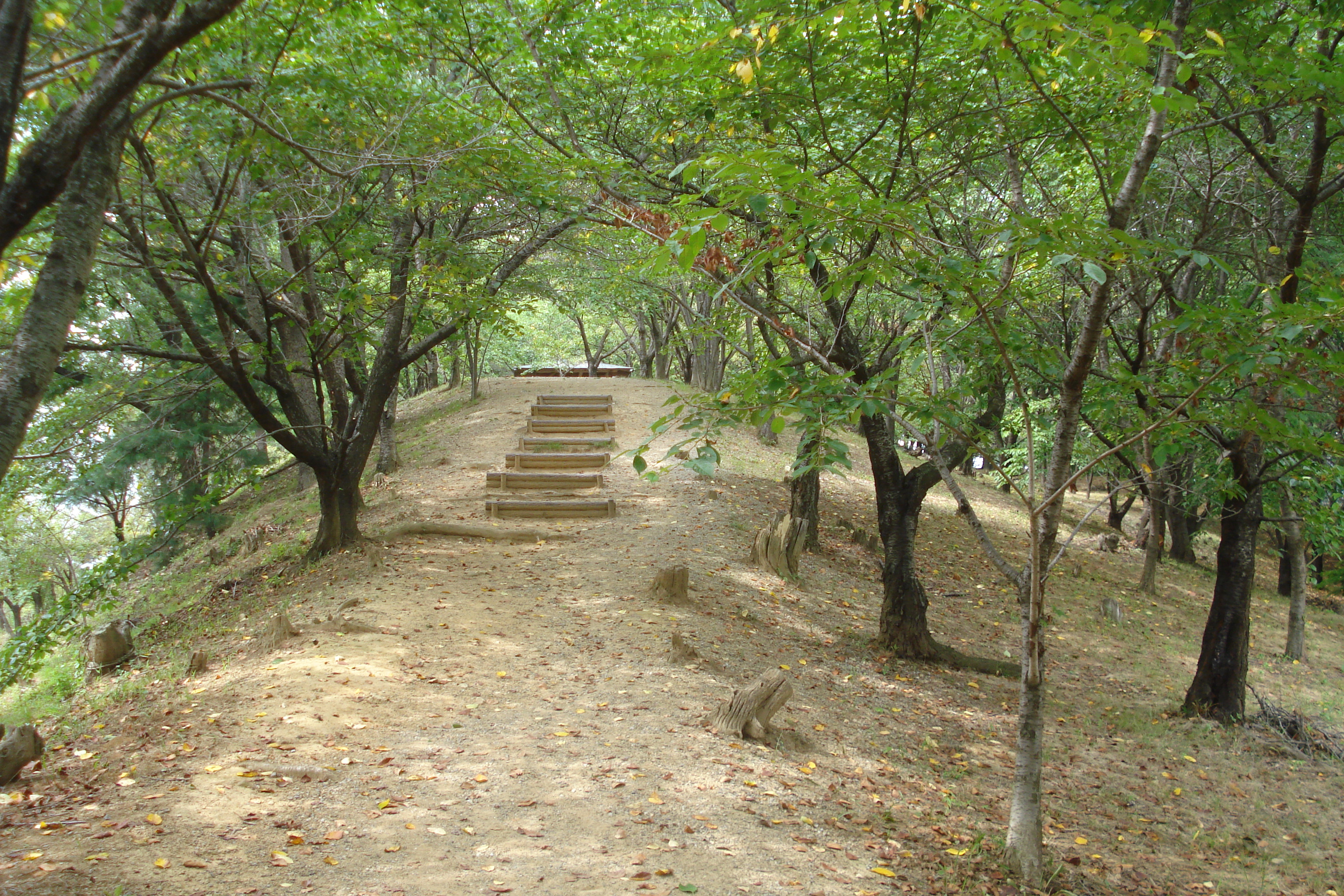 2007年8月 投稿者自身が撮影 弘法山古墳 管理